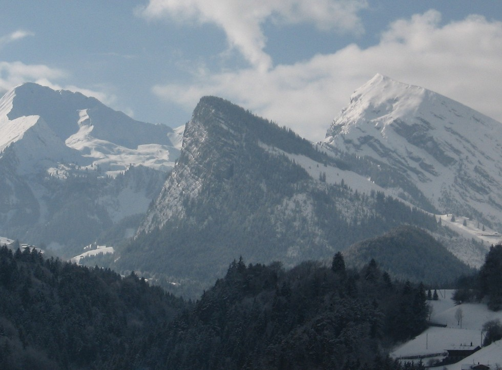 Schwarzeberg von Norden, natürlich der Schwarze in der Mitte, rechts überragt vom Wiriehore